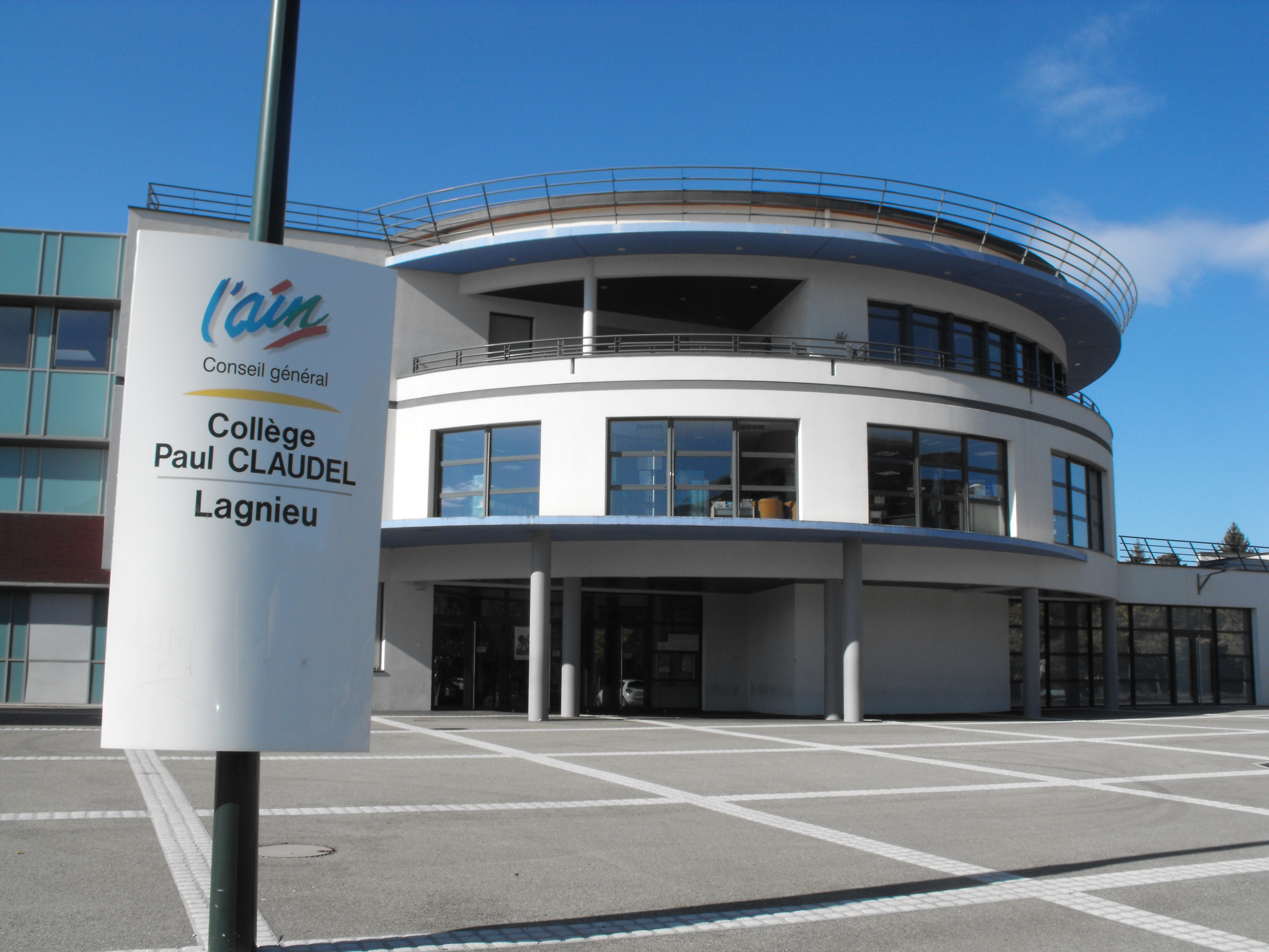 Le collège Paul Claudel situé à Lagnieu, dans l'Ain (France)